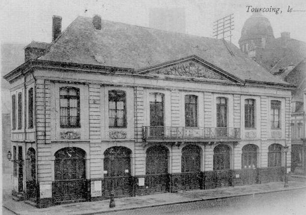 Ancien Hôtel de Ville de Tourcoing (1718-1873), sis sur la Grande Place ; démoli en 1900.